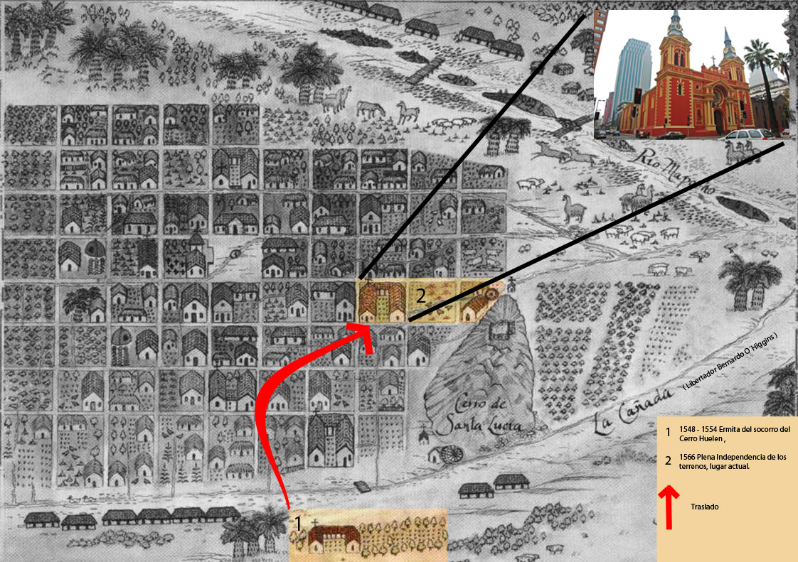 emplazamiento